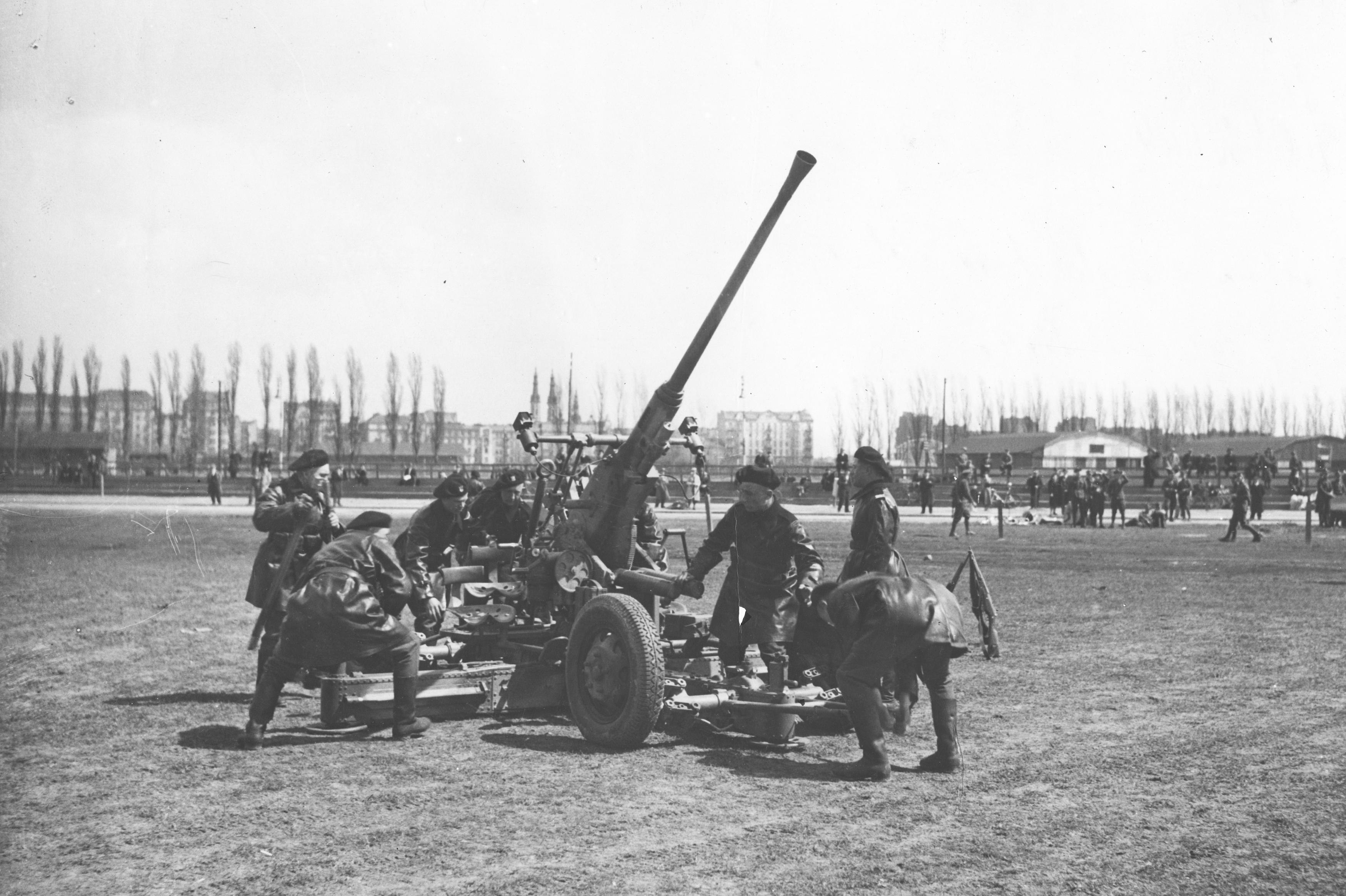 Uroczystości święta 3 Maja w Warszawie w 1938 r. Armata przeciwlotnicza Bofors wz. 36 kal. 40 mm podczas pokazów wojskowych na Polu Mokotowskim. Koncern Ilustrowany Kurier Codzienny - Archiwum Ilustracji. Sygnatura: 1-P-2876-34